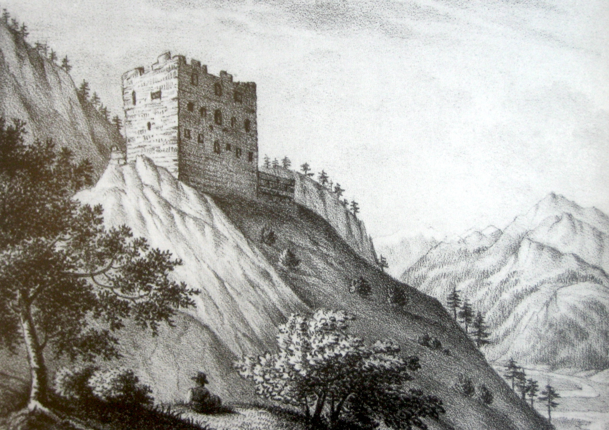 Neuburg um 1835, Stich von Heinrich Kraneck (1785 - 1871)